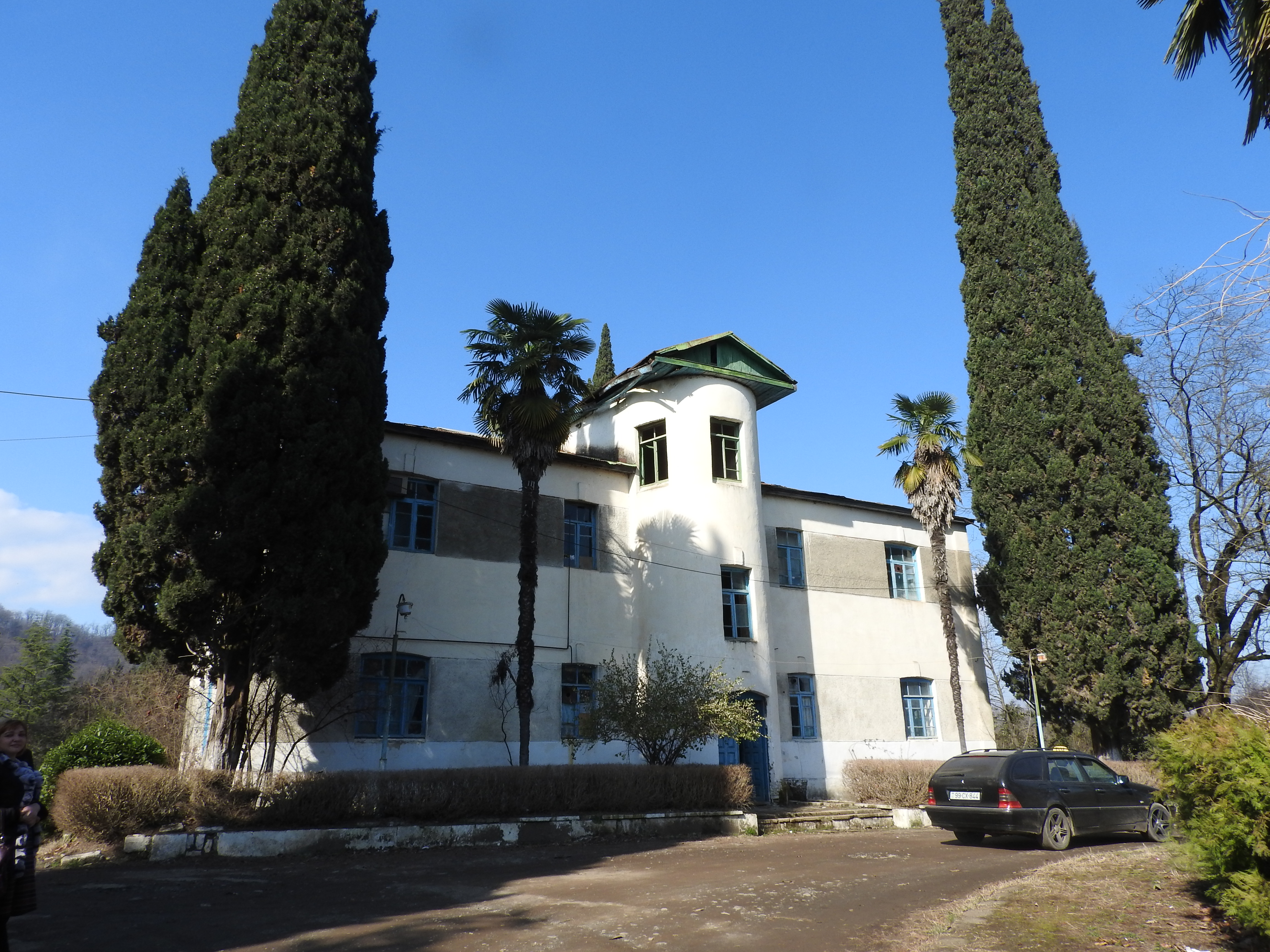 Лесная станция в Ленкорани 2016